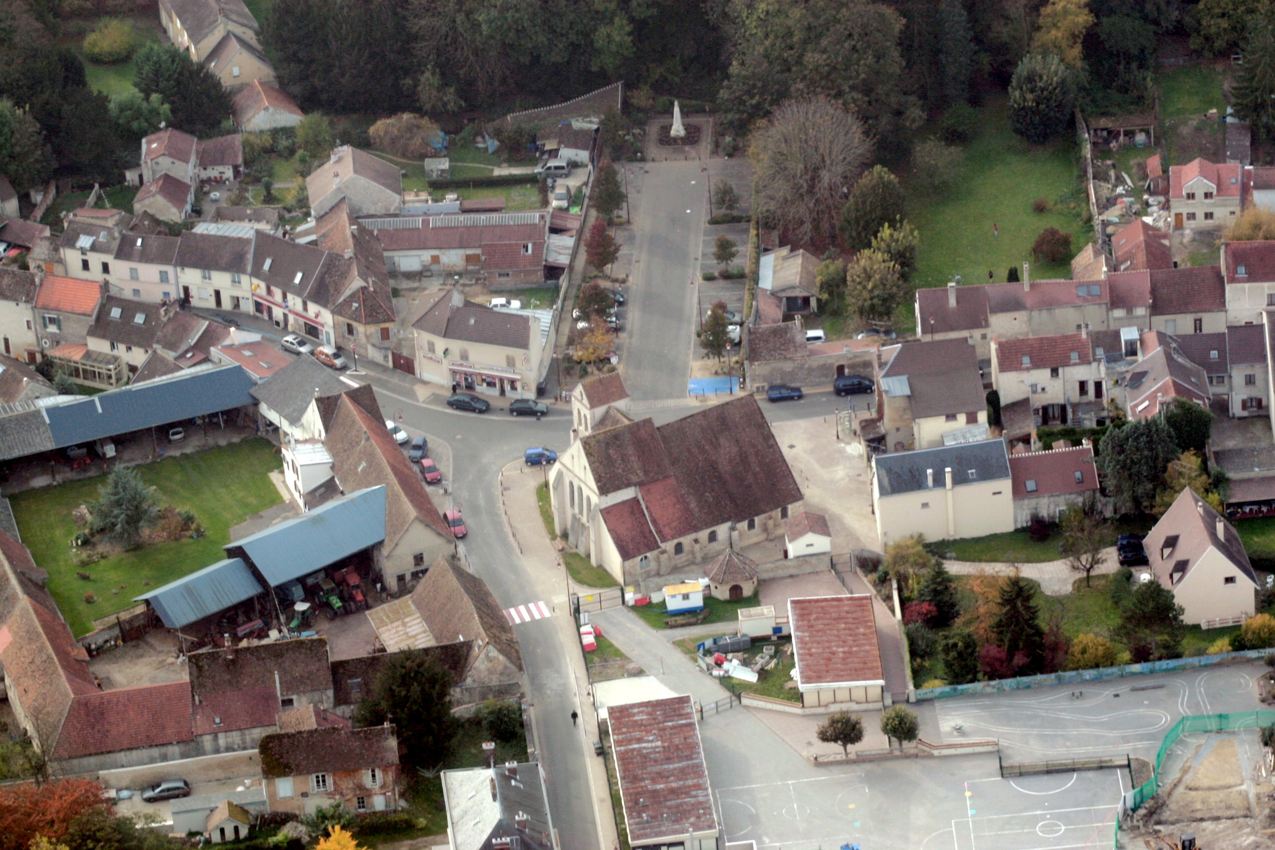 Place centrale du village. On peut voir l'église, la ferme, l'école (en travaux), le monument aux morts, le café des sports